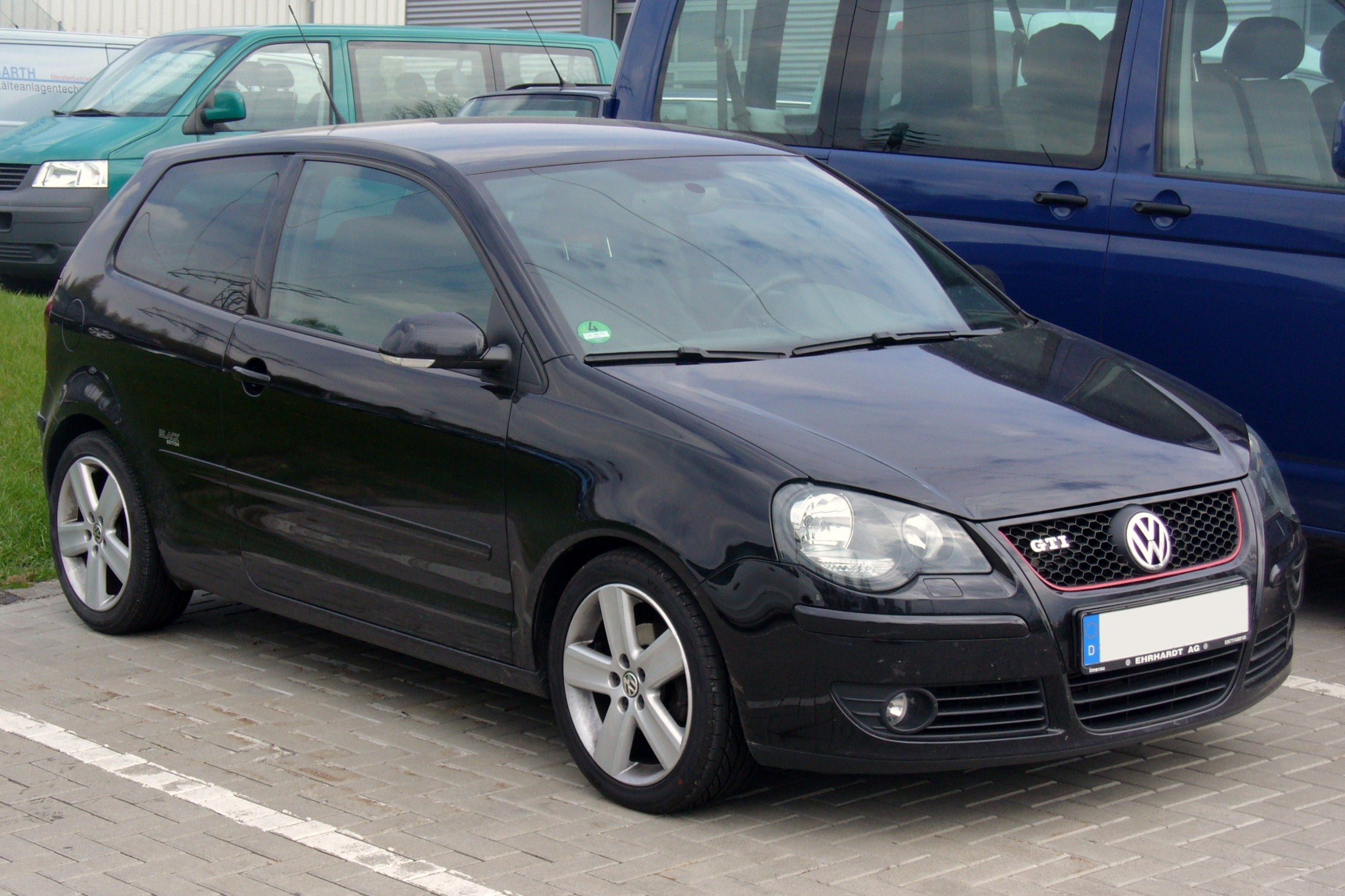 VW Polo IV